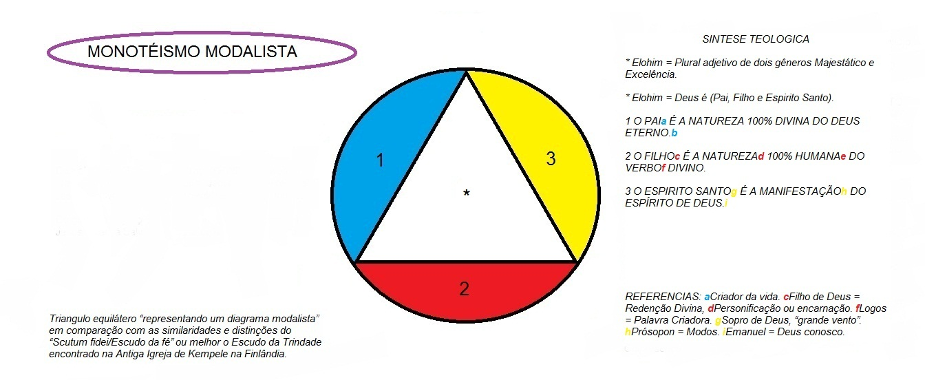 Triangulo equilátero “representando um diagrama modalista” em comparação com as similaridades e distinções do “Scutum fidei/Escudo da fé” ou melhor o Escudo da Trindade encontrado na Antiga Igreja de Kempele na Finlândia.